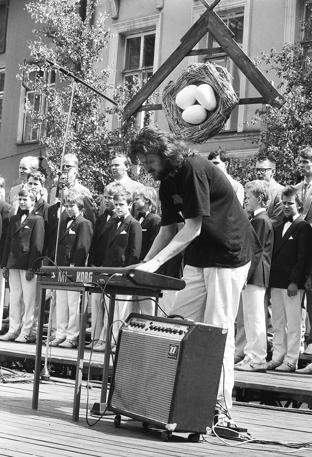 Alo Mattiisen, helilooja I Ülemaailmsete eesti noorte päevadel 89